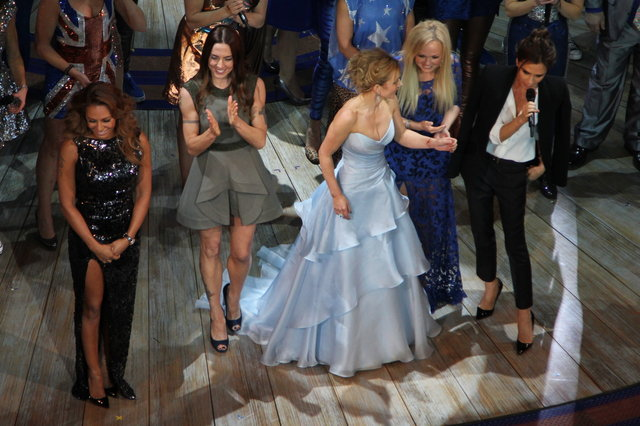 The Spice Girls at the première of the Viva Forever musical